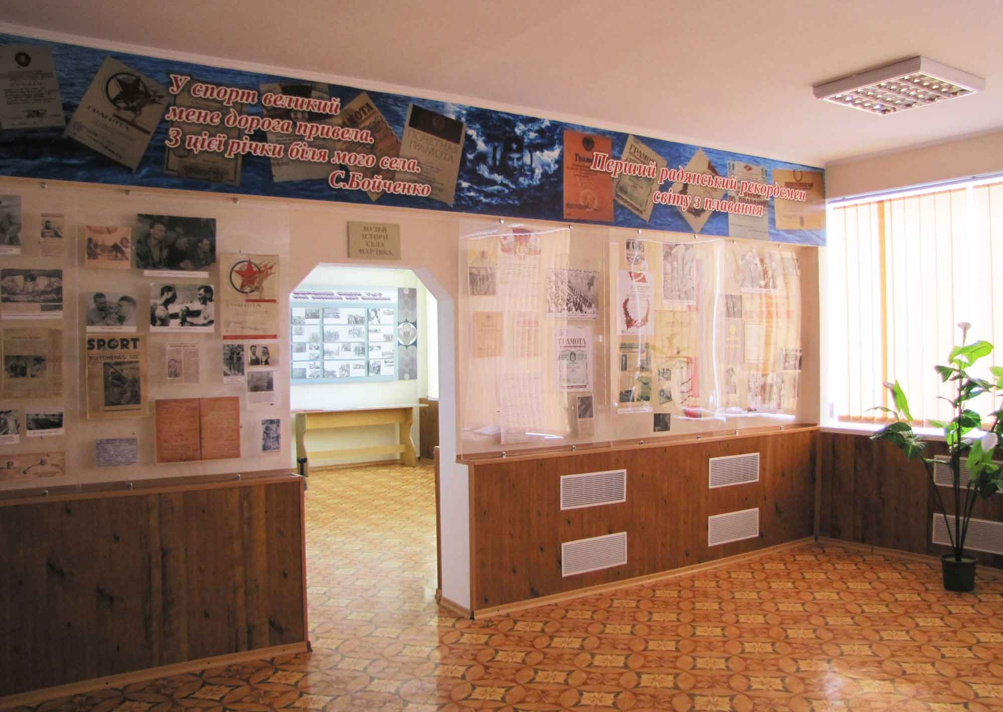 Село Марьевка. Музей Бойченко